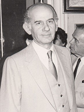 Eugenio Cruz Vargas (Santiago, 2 de octubre de 1923 - Olmué, 18 de enero de 2014) fue un notable pintor y poeta chileno, autodidacto, cuya obra plástica se desarrolló en el marco del paisajismo naturalista y la abstracción, y su poemario bajo los conceptos del surrealismo terminando en el creacionismo.